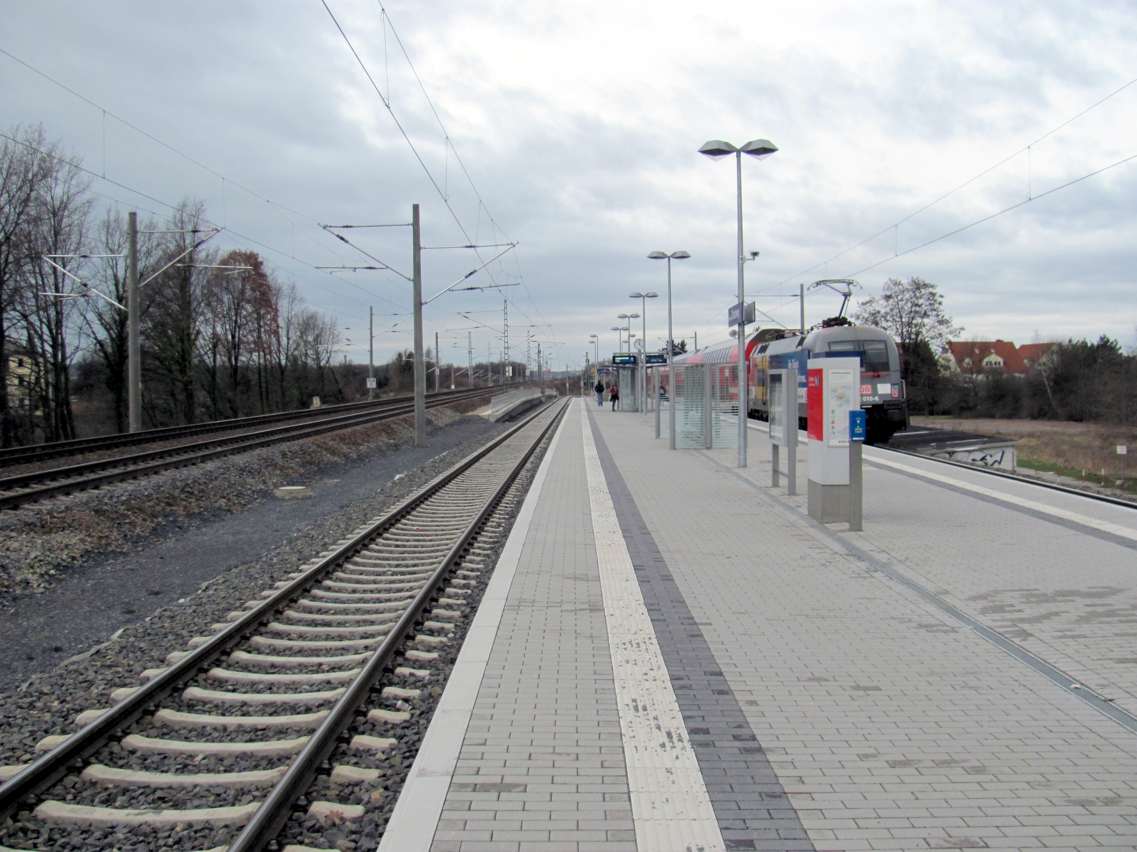 Radebeul, Haltepunkt Radebeul-Zitzschewig, Blick Richtung Coswig, links die Schnellstrecke Leipzig–Dresden